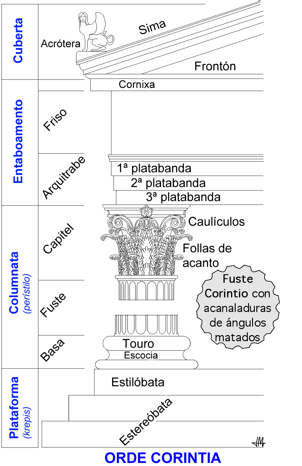 ORDE CORINTIA: Plataforma escalonada (krepis ou crepidoma), Columnata (perístilo), Fuste con acanaladuras de arestas matadas; Capitel: follas de acanto, Caulículos ou pequenas volutas, Ábaco. Entaboamento: Arquitrabe dividido en tres bandas (platabandas). Friso corrido Cornixa, Cuberta, Frontón, Vertente ou Sima